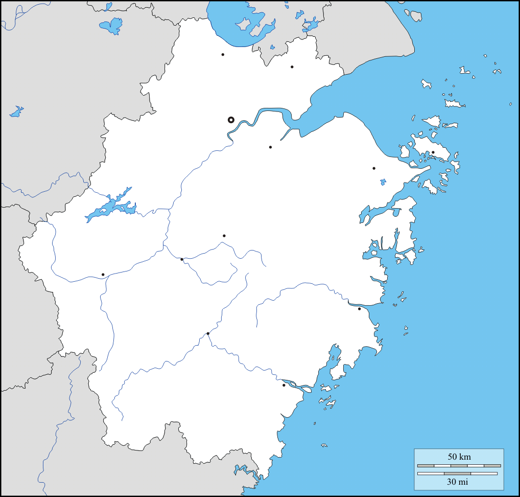 中国浙江省地理位置图。来源：OpenStreetMap